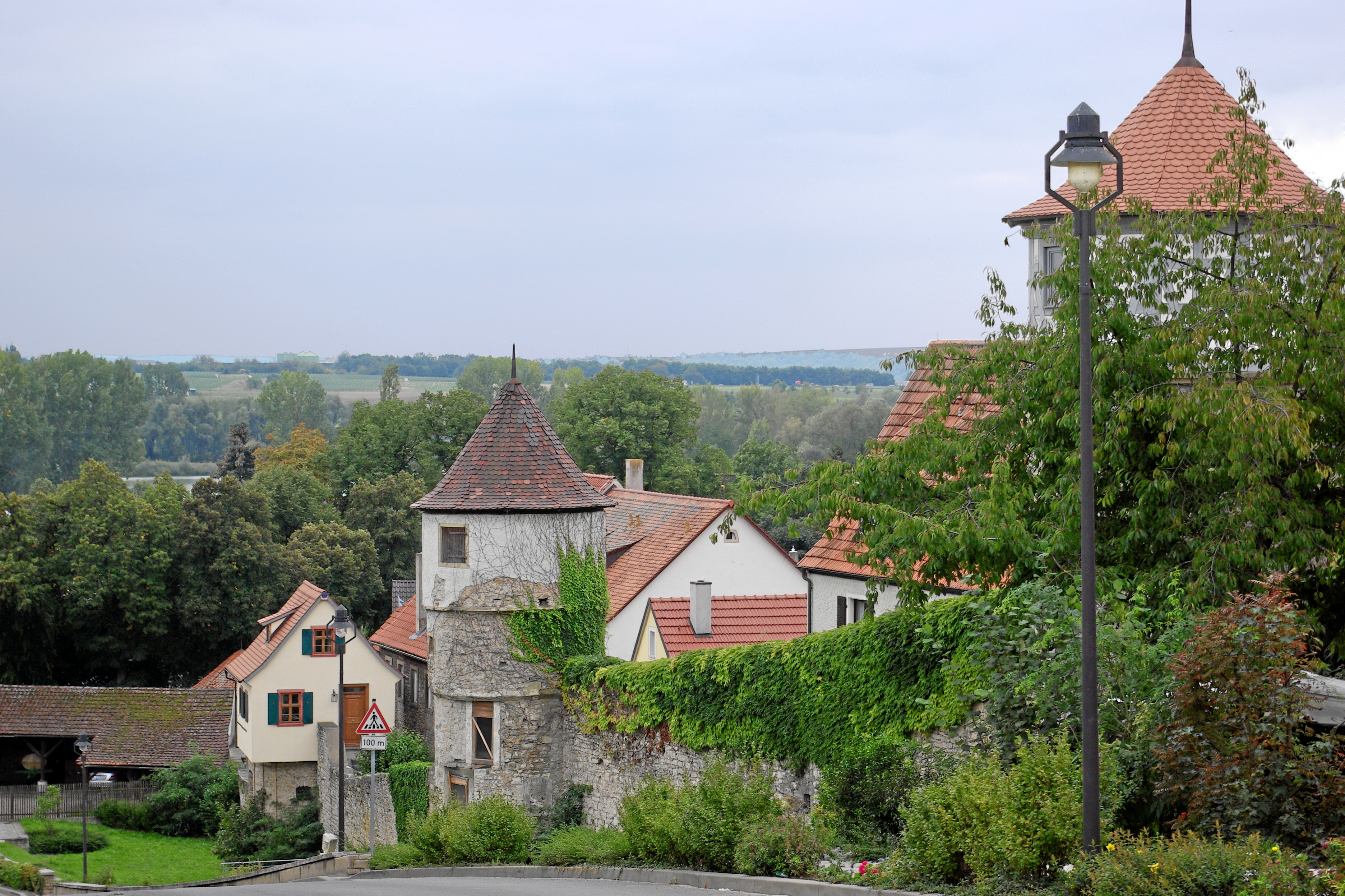 Dettelbach